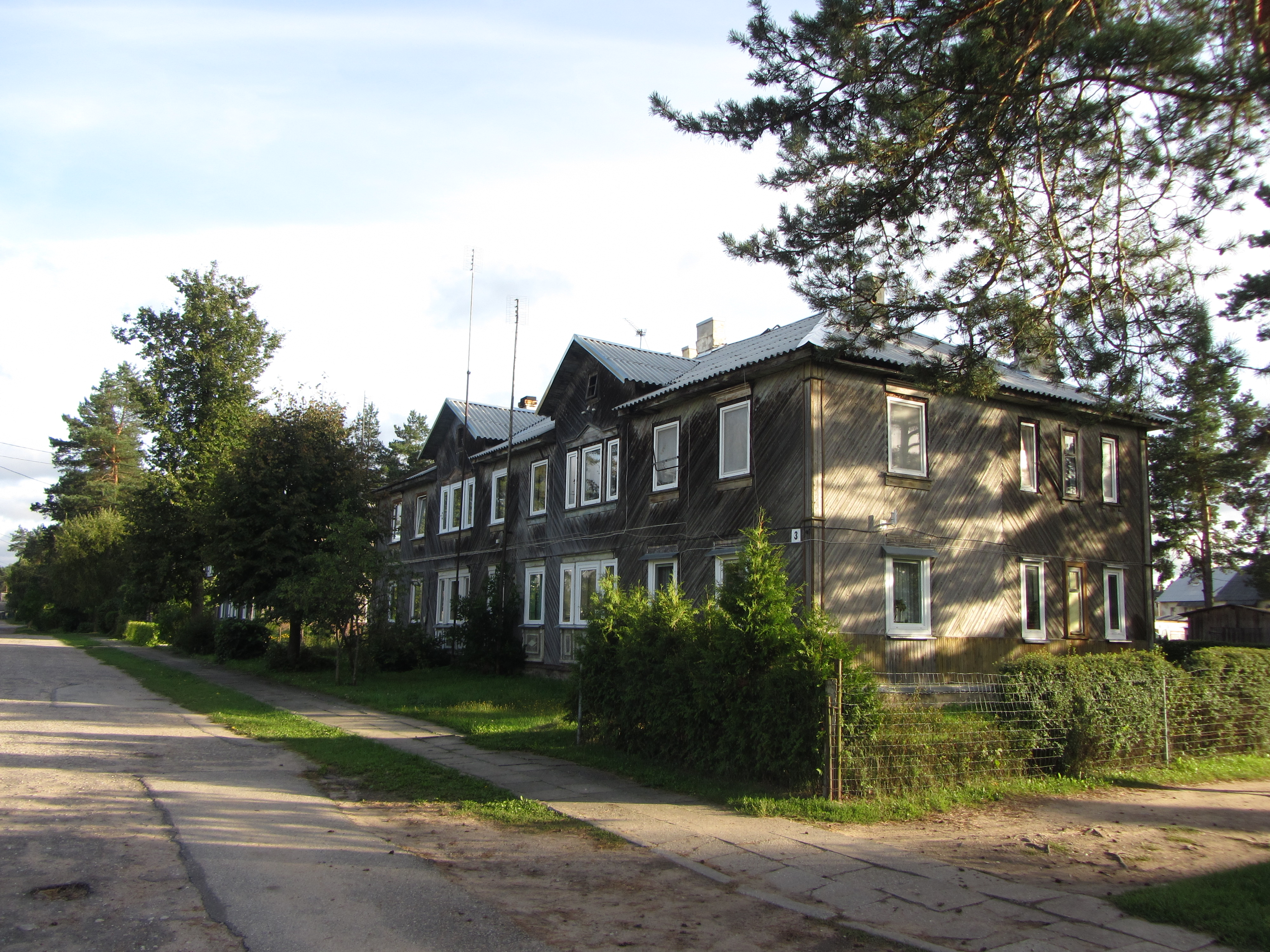 Baltoji Vokė, Lithuania